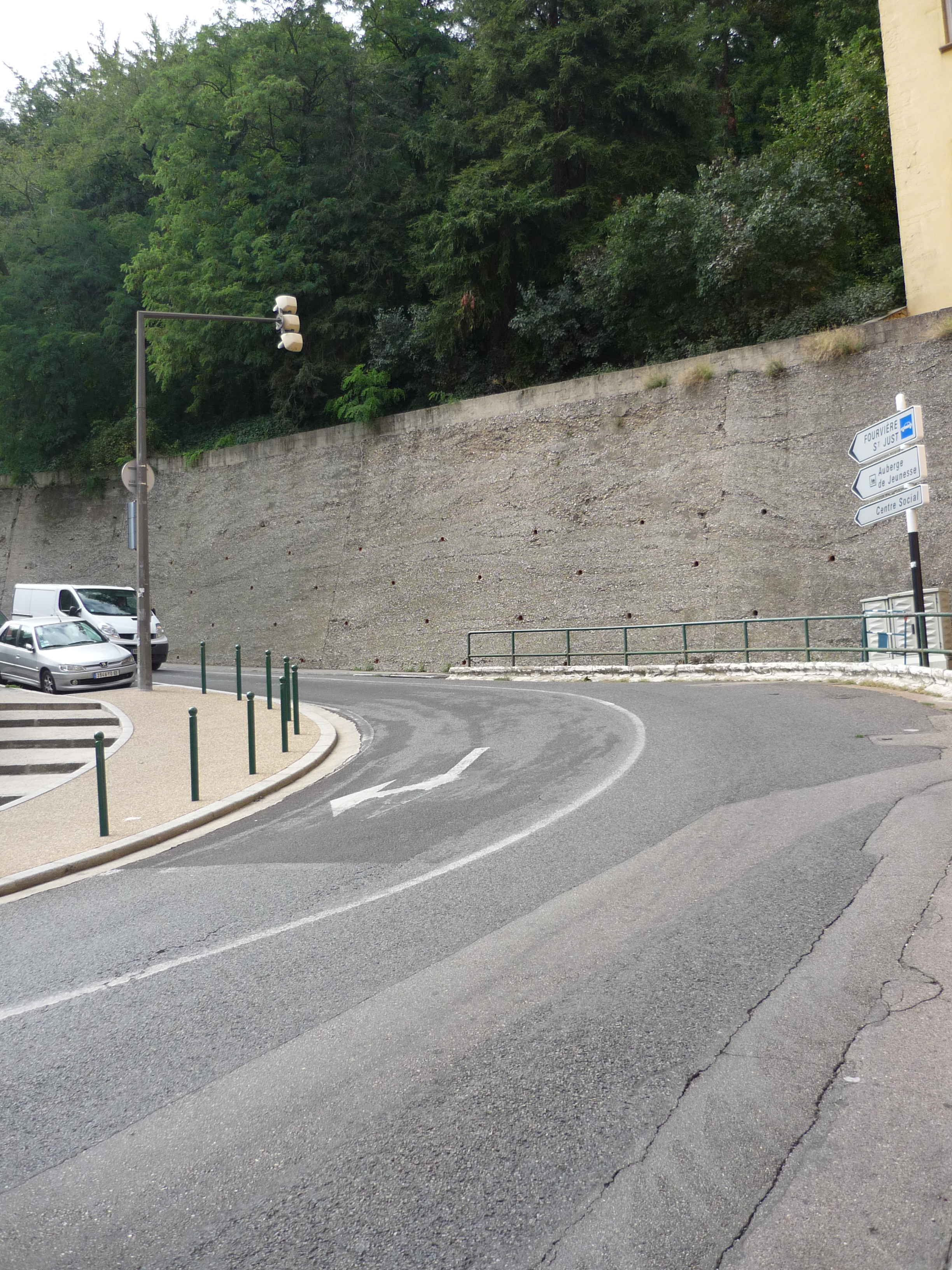 Lyon - Montée du Chemin-Neuf - Vue du bas de la montée, à l'angle des rues de la Bombarde, Tramassac et Boeuf